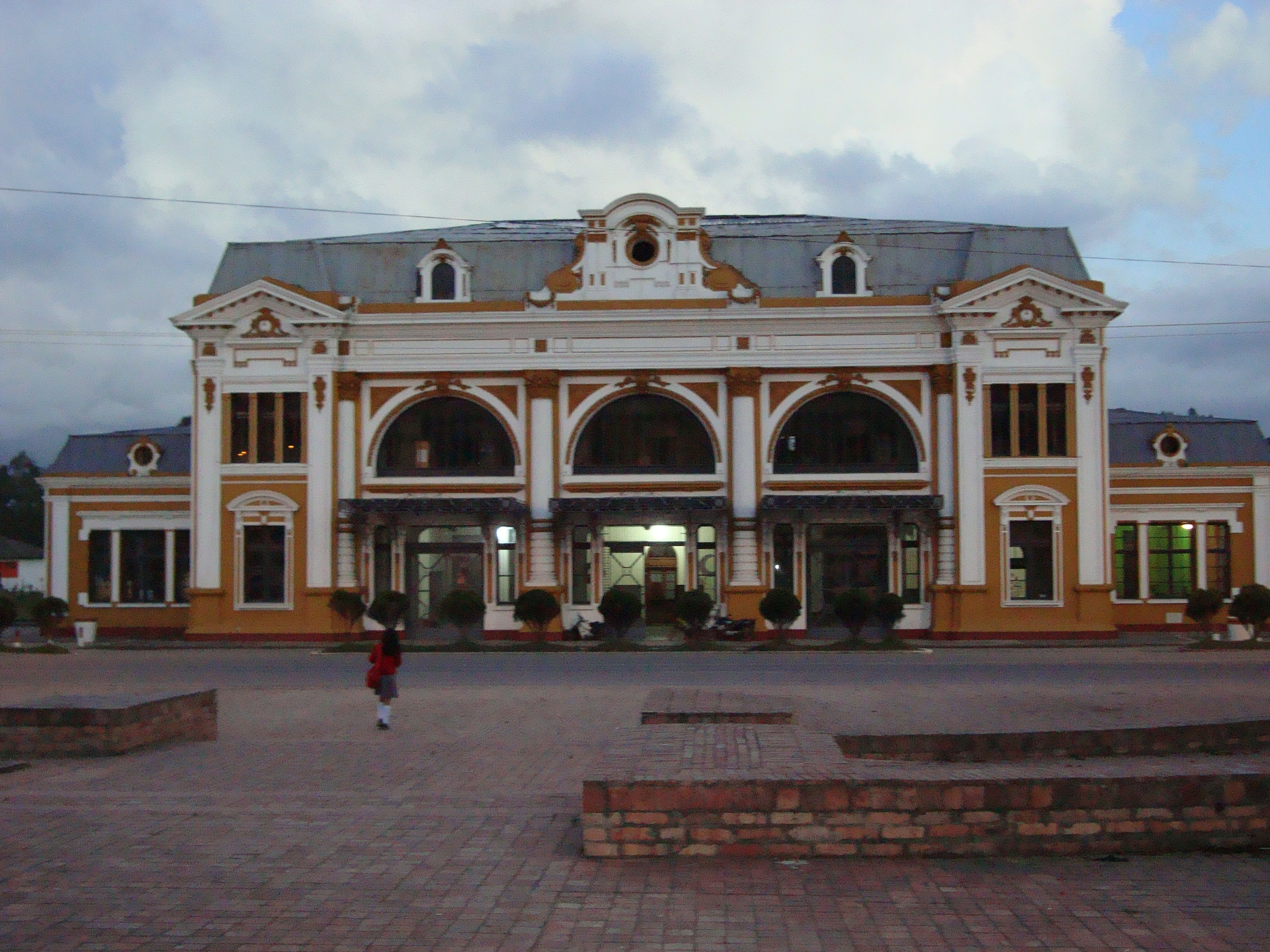 Casa de la cultura, antigua estación del ferrocarril en la Ciudad de Chiquinquirá Boyacá Colombia